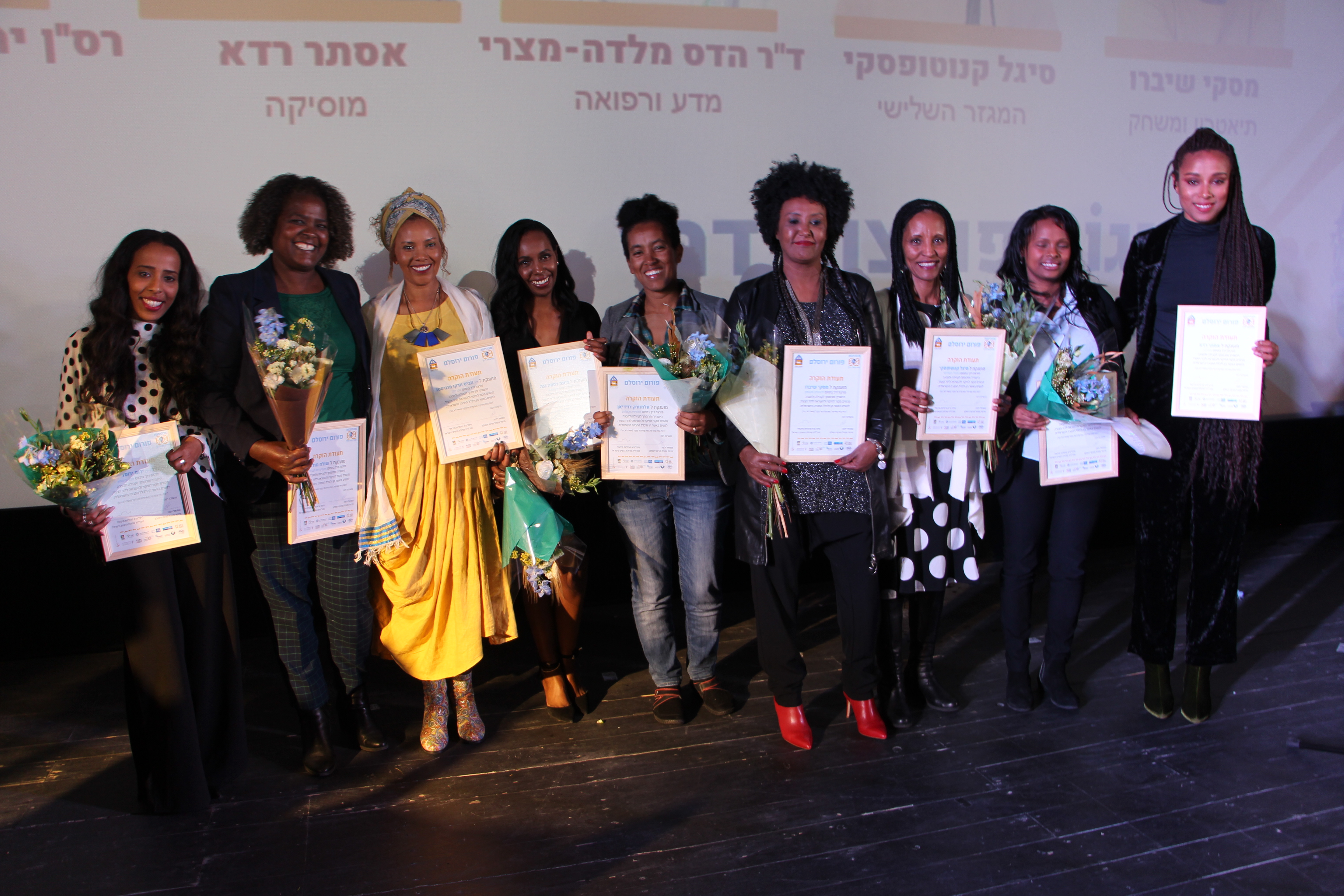 נשים פורצות דרך בכנס השלישי של פורום ירוסלם, שנערך בסינמטק תל אביב